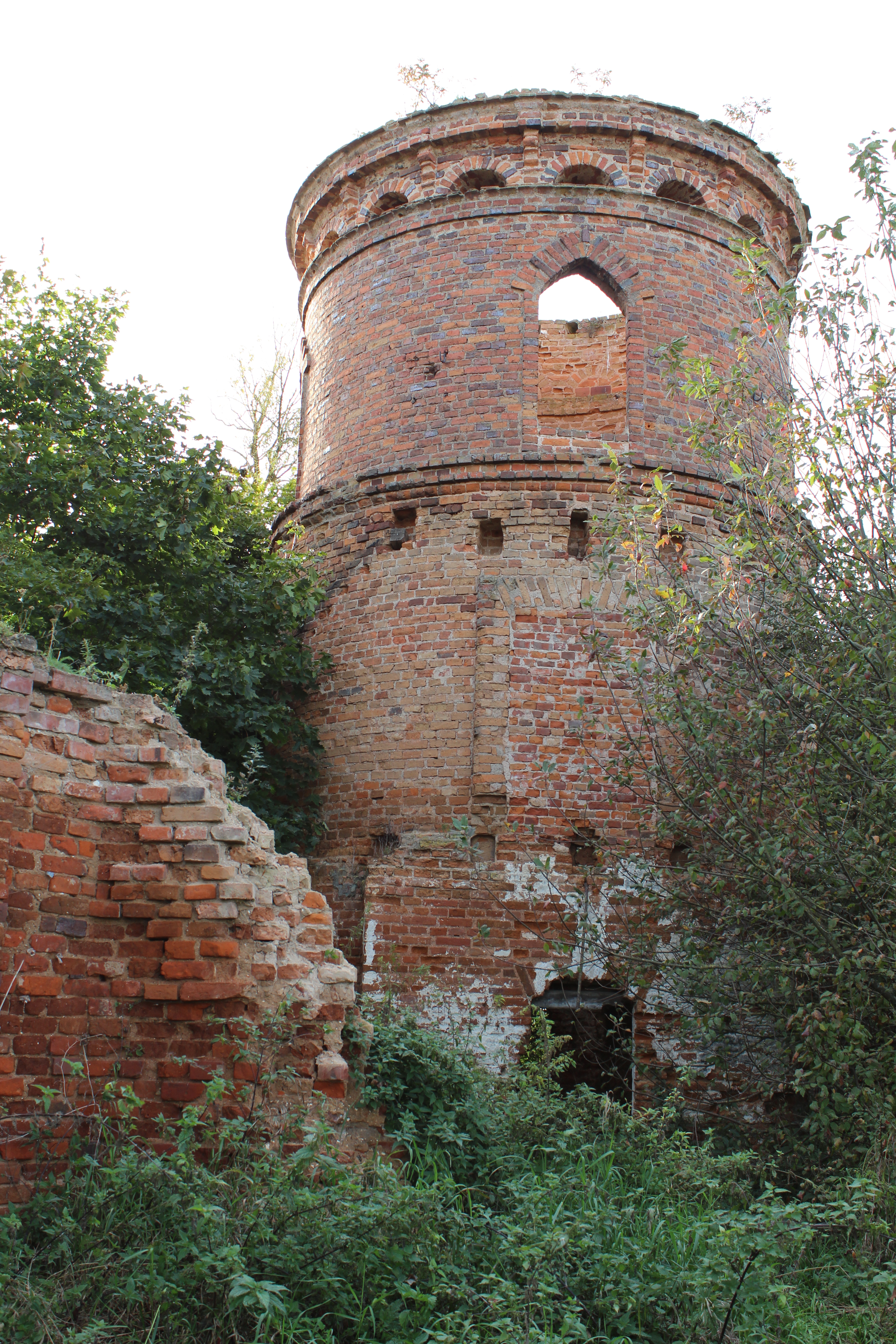 Беларуская (тарашкевіца): Фрагмэнты ансамбля былога палаца Храптовічаў:флігельвяндлярняпаркбібліятэка. в. Шчорсы This is a photo of Belarusian heritage monument. Reference number: 412Г000467 ( WLM)